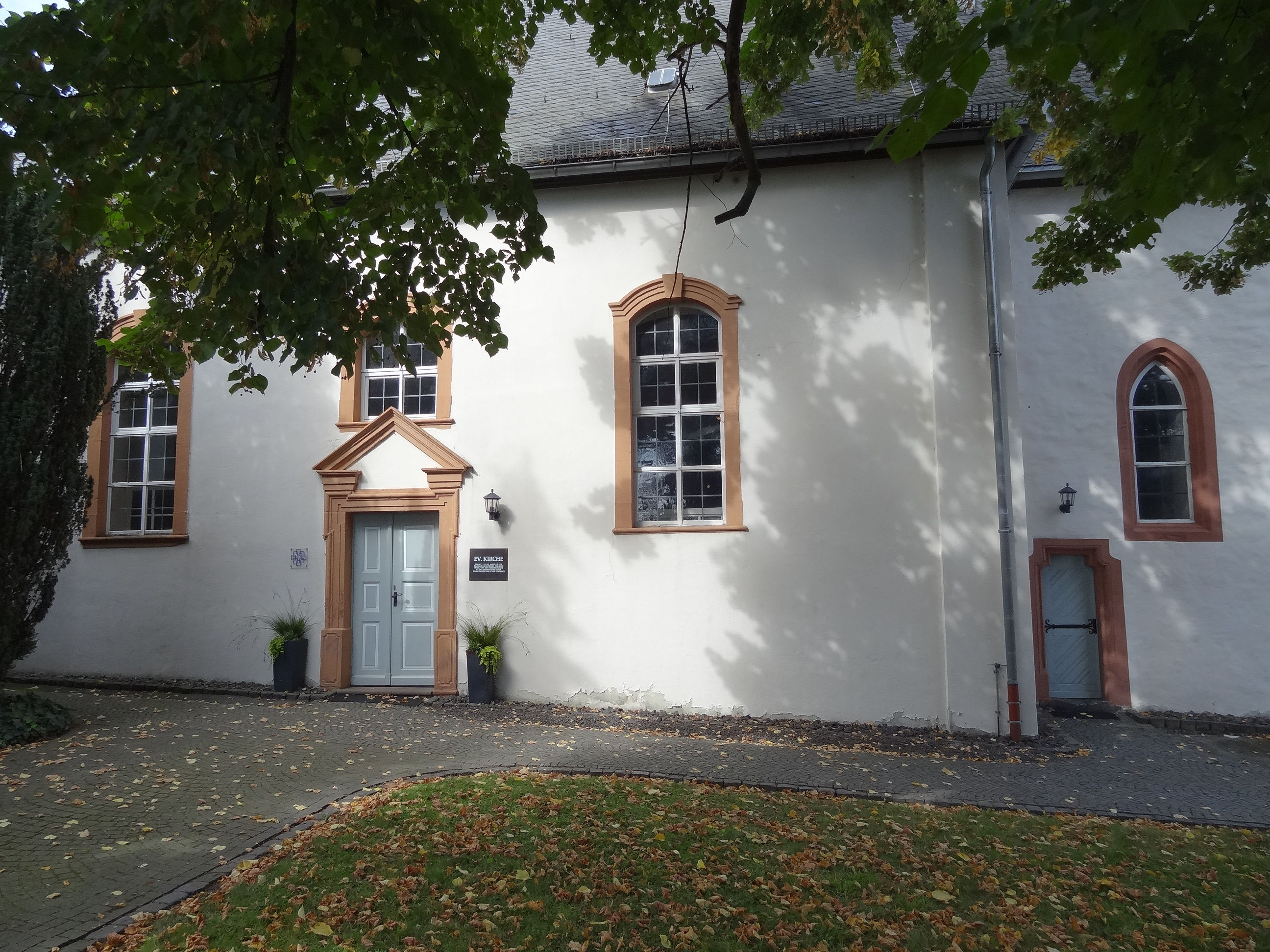 Evangelische Kirche Obbornhofen